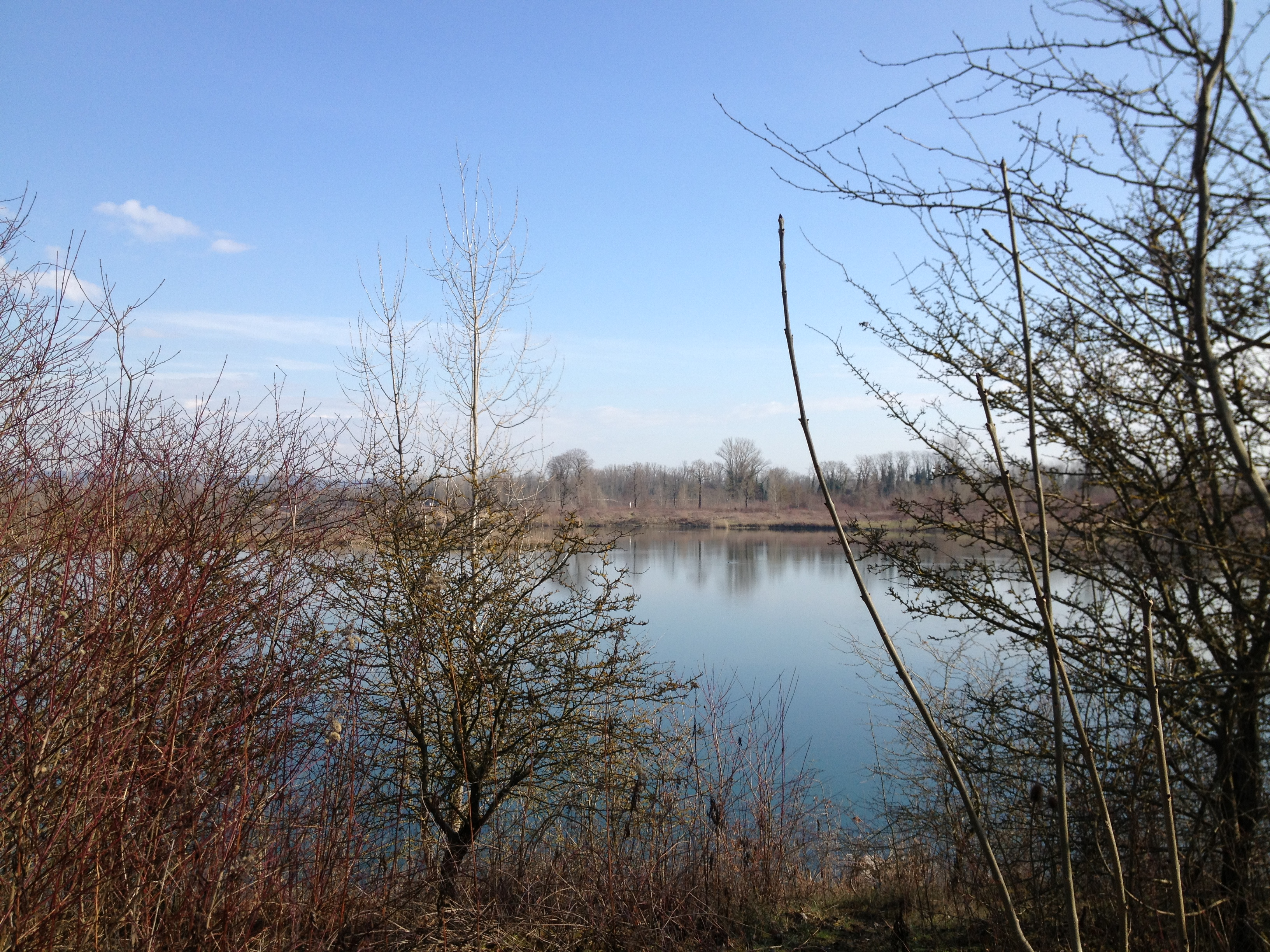 Grand Parc de Miribel-Jonage.